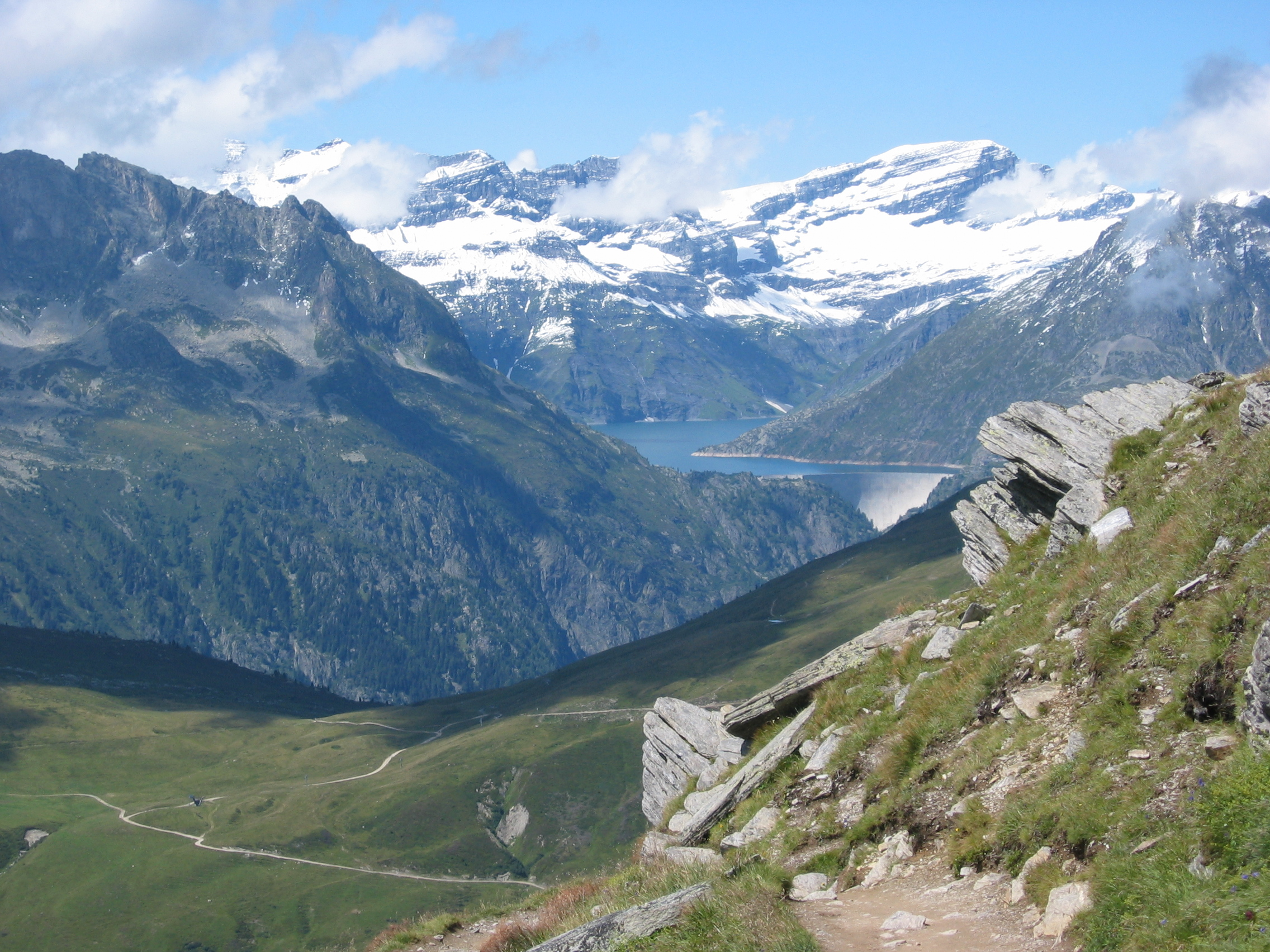 Barrage d'Émosson vu du col de Balme (chemin du Glacier du Tour), Chamonix, France